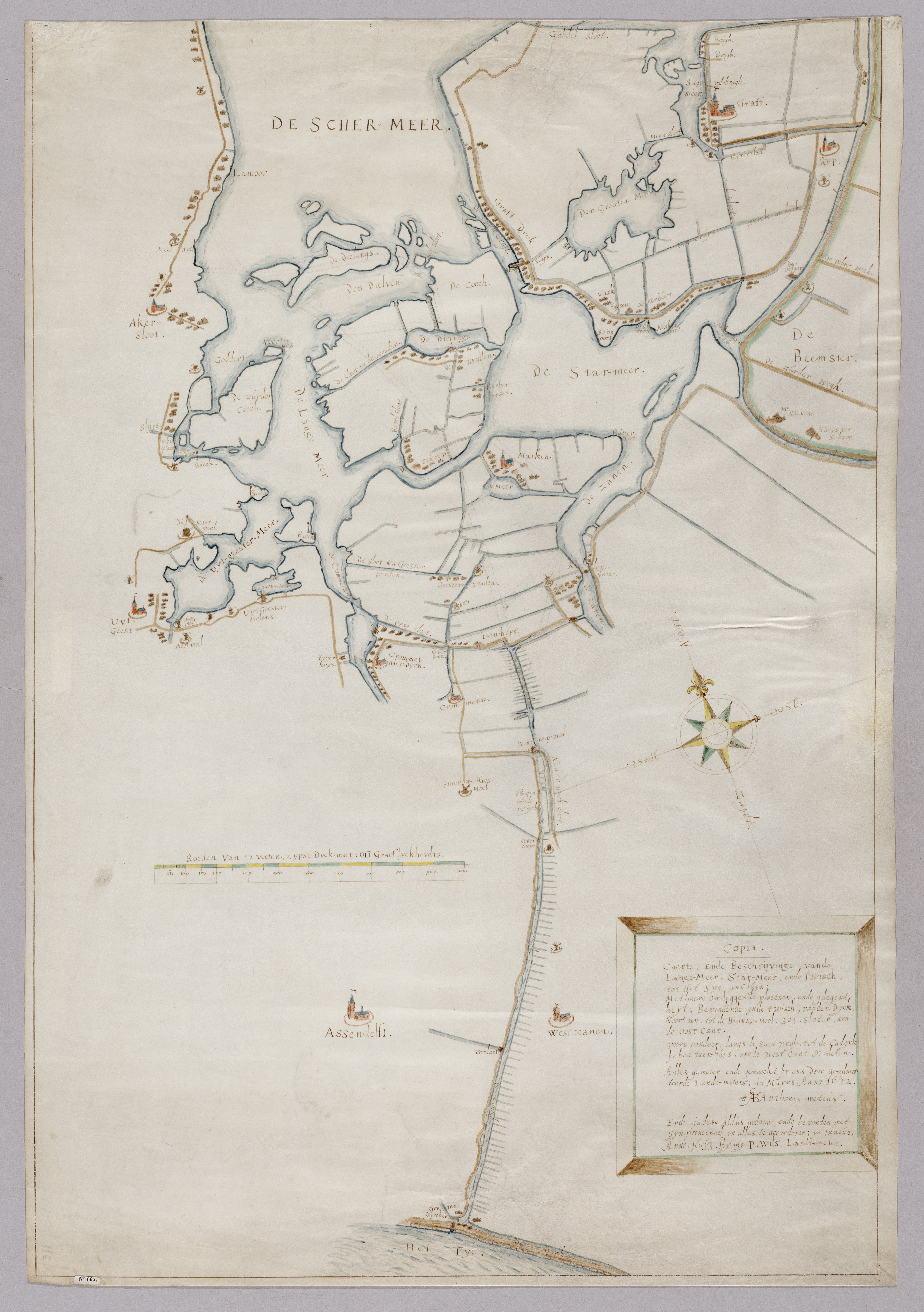 Kaart van de Schermer, de Langemeer, Starmeer, Grootemeer en Uitgeestermeer, met de uitwatering op het IJ. Tekening in kleur op perkament uit 1633, door Pieter Wils, landmeter werkzaam van 1621-ca.1648, formaat 64 x 44 cm. Noord-Hollands Archief. Collectie Kennemerland. Inventarisnummer NL-HlmNHA_51000311_G.